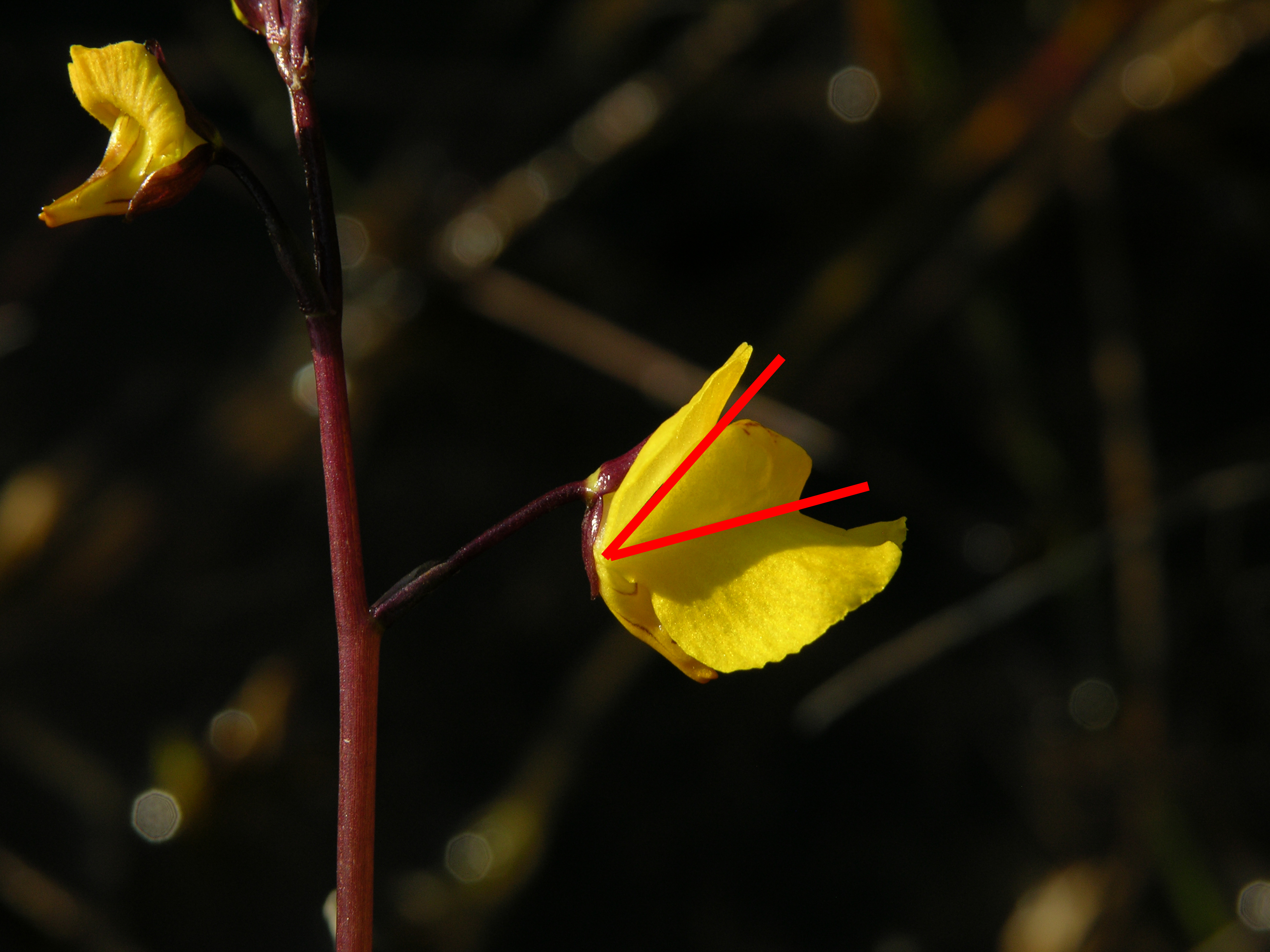 Utricularia vulgaris